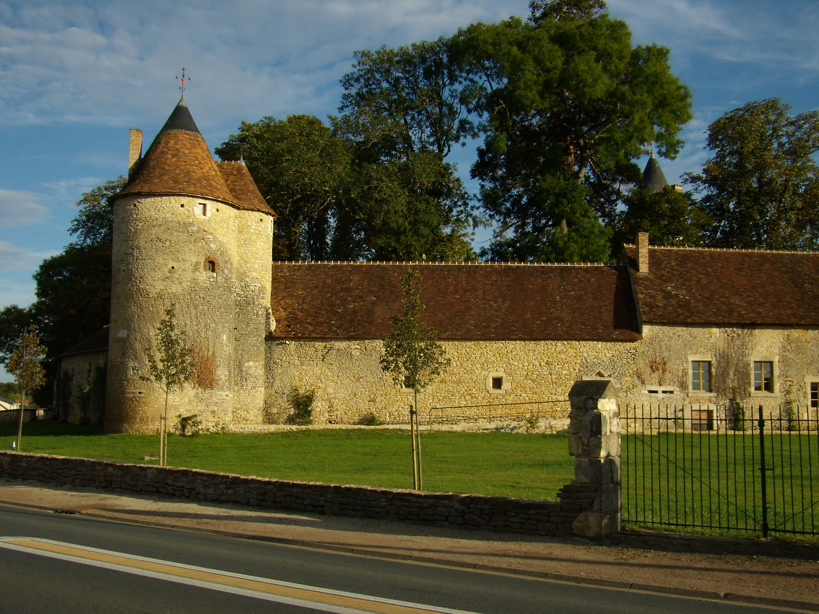 Bouesse - Une tour du Château